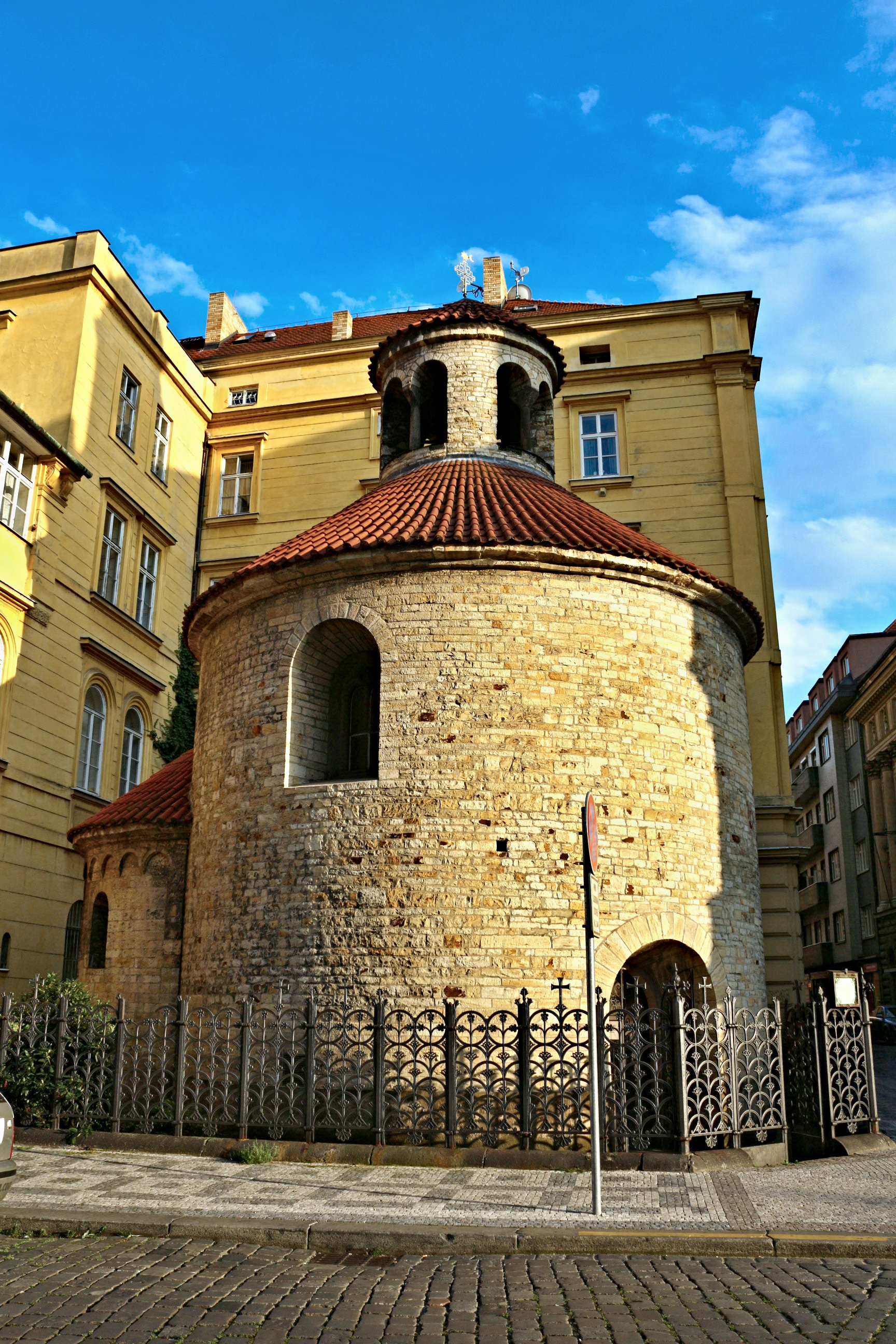 Staré Město, rotunda Nalezení sv. Kříže